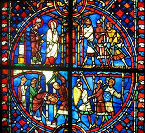 Vitrail du XIIIe siècle, église de Soissons, histoire de saint Nicaise (Musée du Louvre)